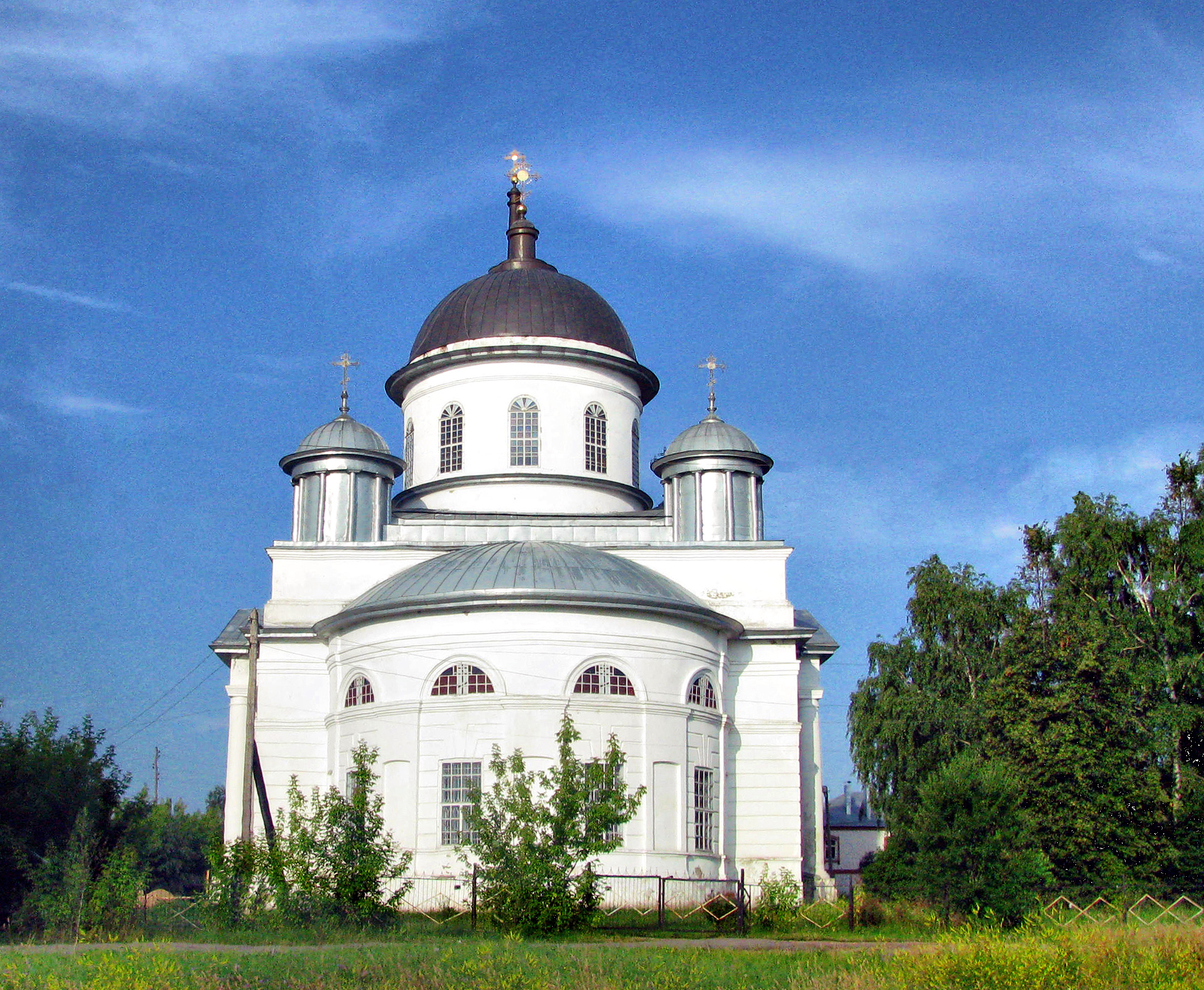 с. Богоявление: Богоявленская церковь, Дальнеконстантиновский район Нижегородской области